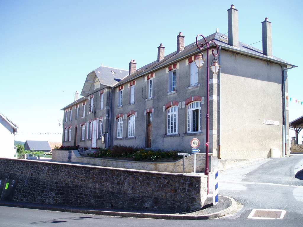 Description Mairie de FollesDate 23 July 2006Source Mon OeuvreAuthor Martial Mairie de Folles